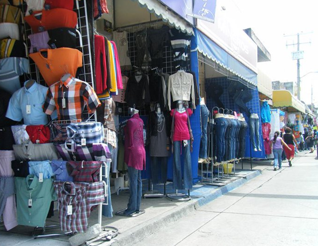 Uriangato, la ropa que se vende en esta ciudad.